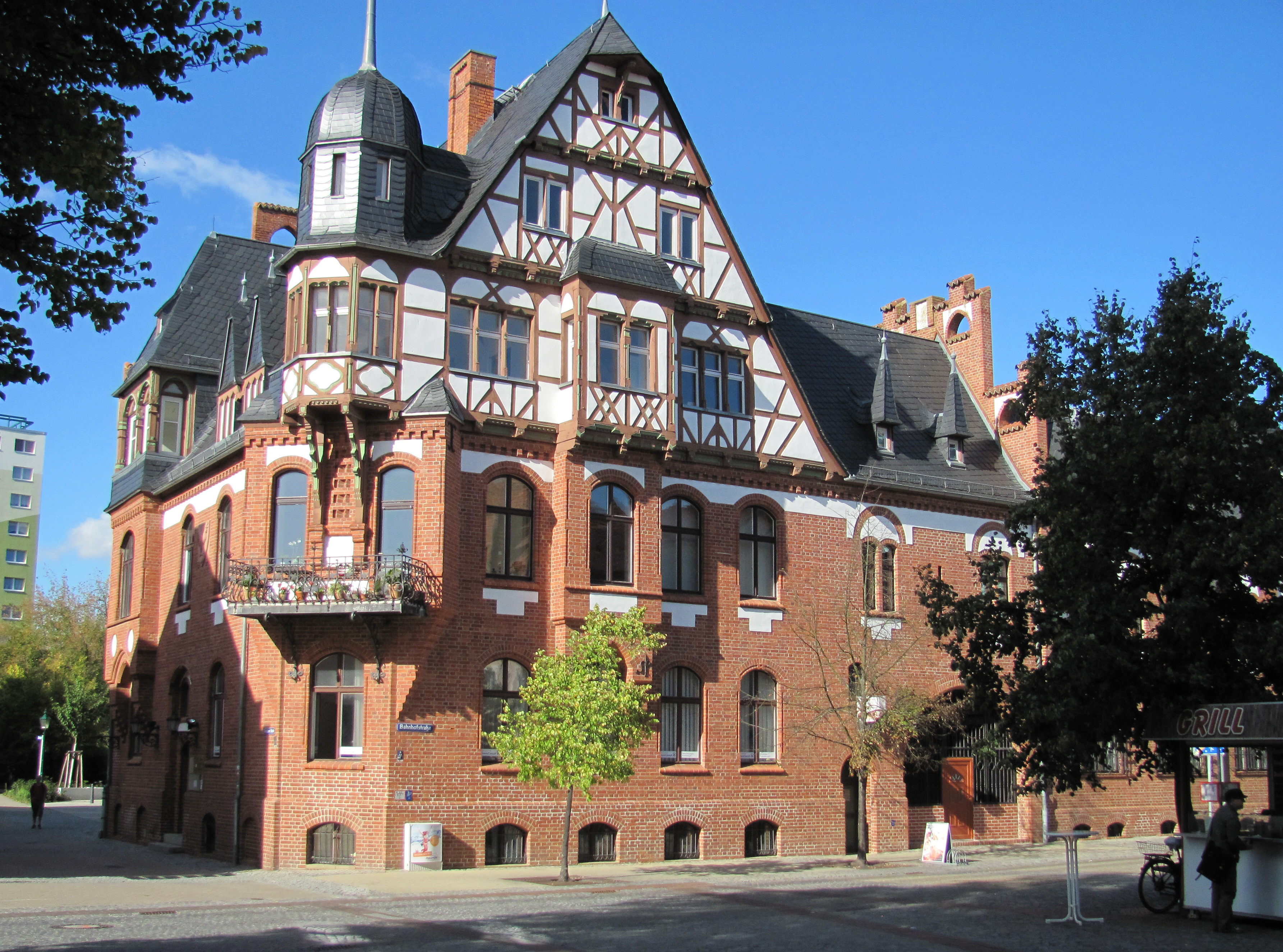 Ehemalige Stadtmühle und Seifenfabrik in der Schwedter Vierradener Straße 44 Schwedt, Denkmalliste Nr. 37